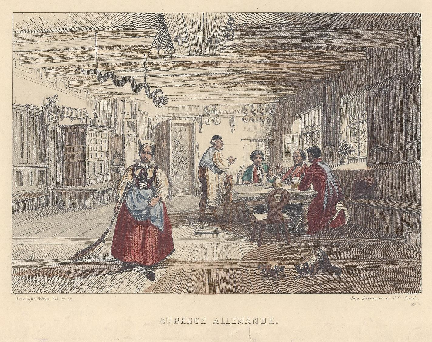 Frères Rouarge: Auberge allemande (Rebstock Waldshut) um 1840. Stahlstich 1858.